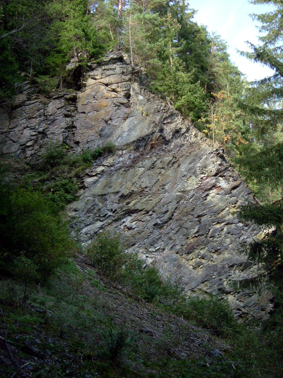 Geotop Oertels Dachschieferbruch